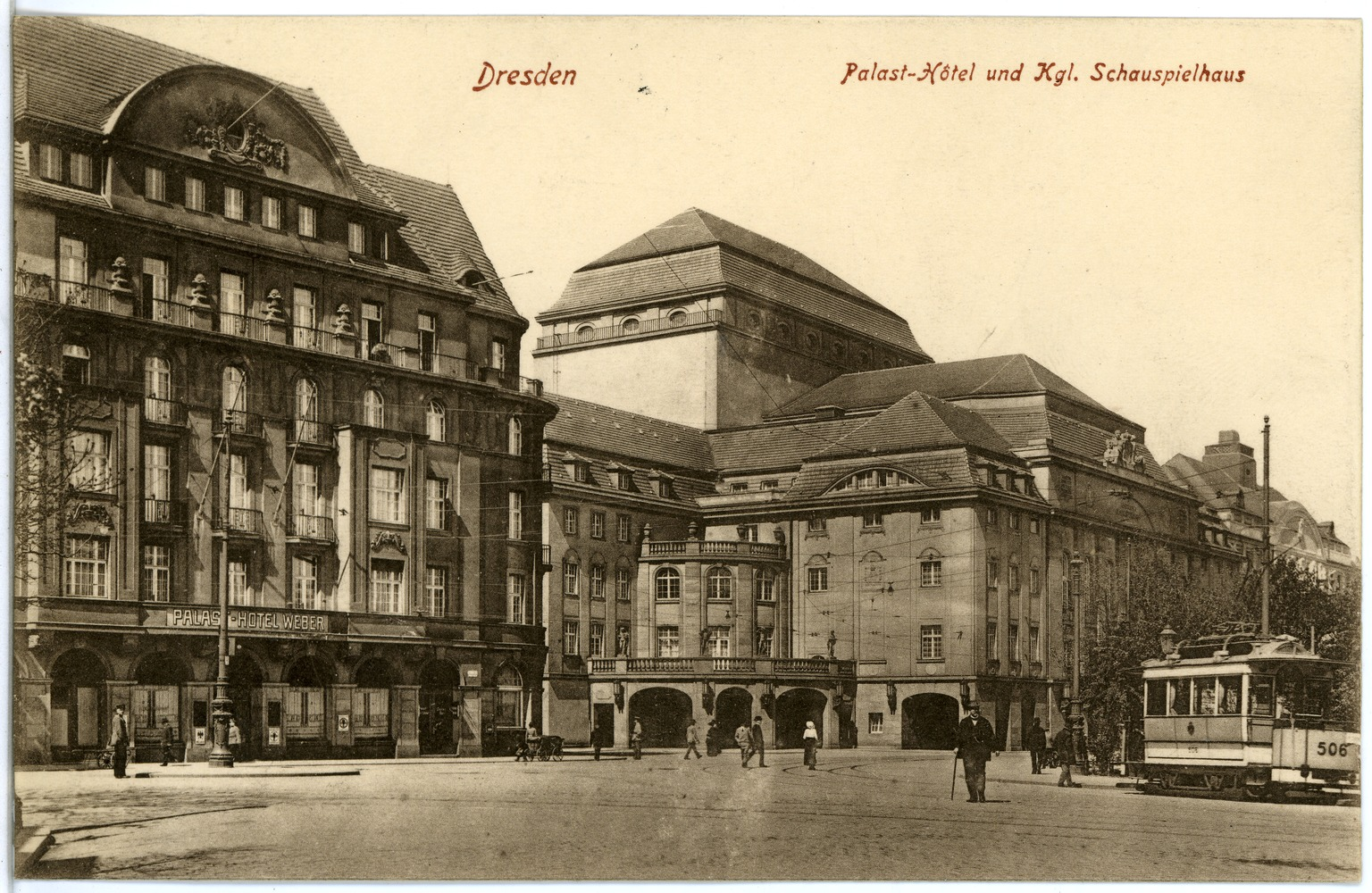 Dresden; Palasthotel und Theater This postcard is from publisher Brück & Sohn in Meißen ( postcard has a unique number 18953 and is available in a higher resolution at the publisher. This images was uploaded in a cooperation project between Wikipedians and the publisher.